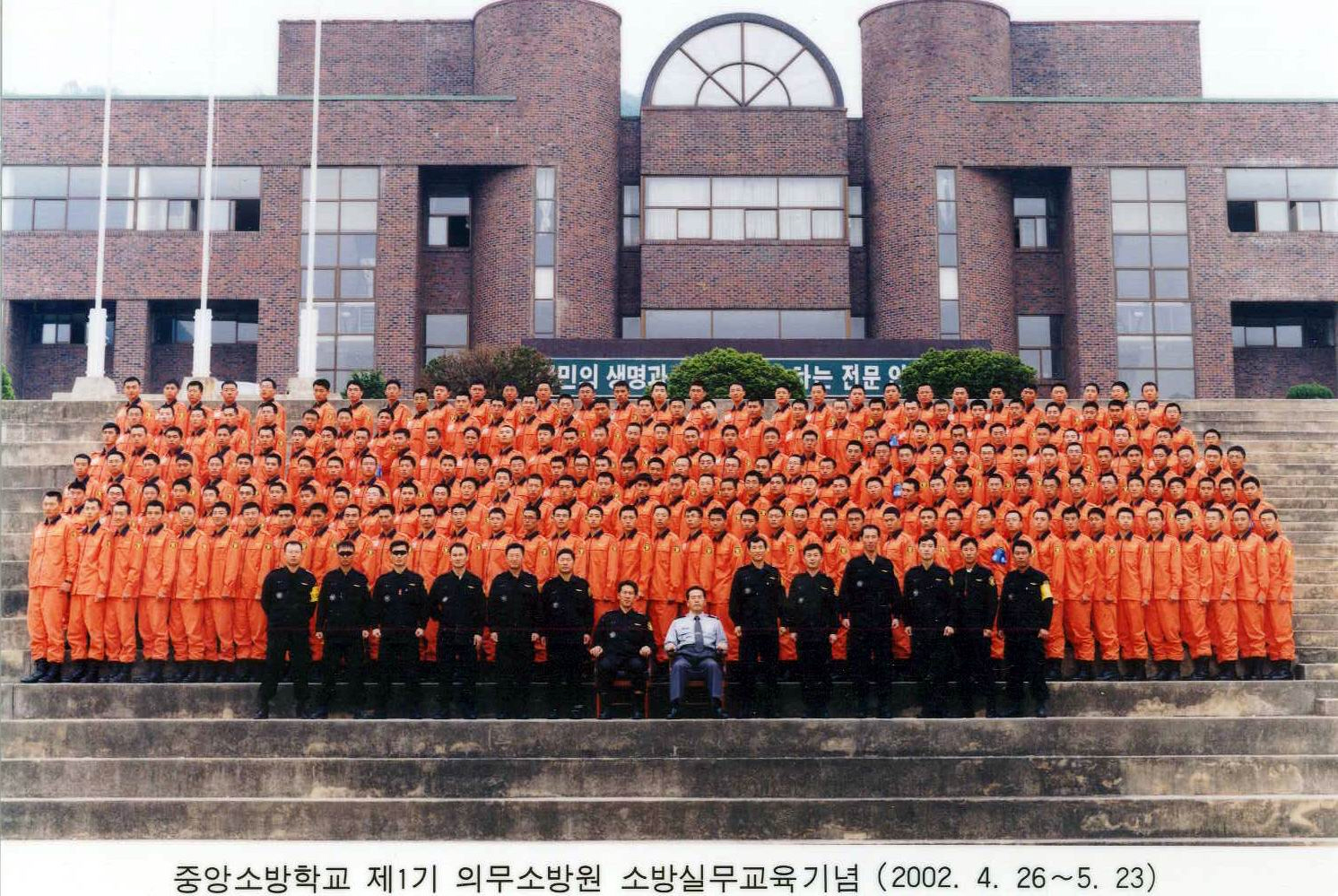 대한민국 제1기 의무소방원